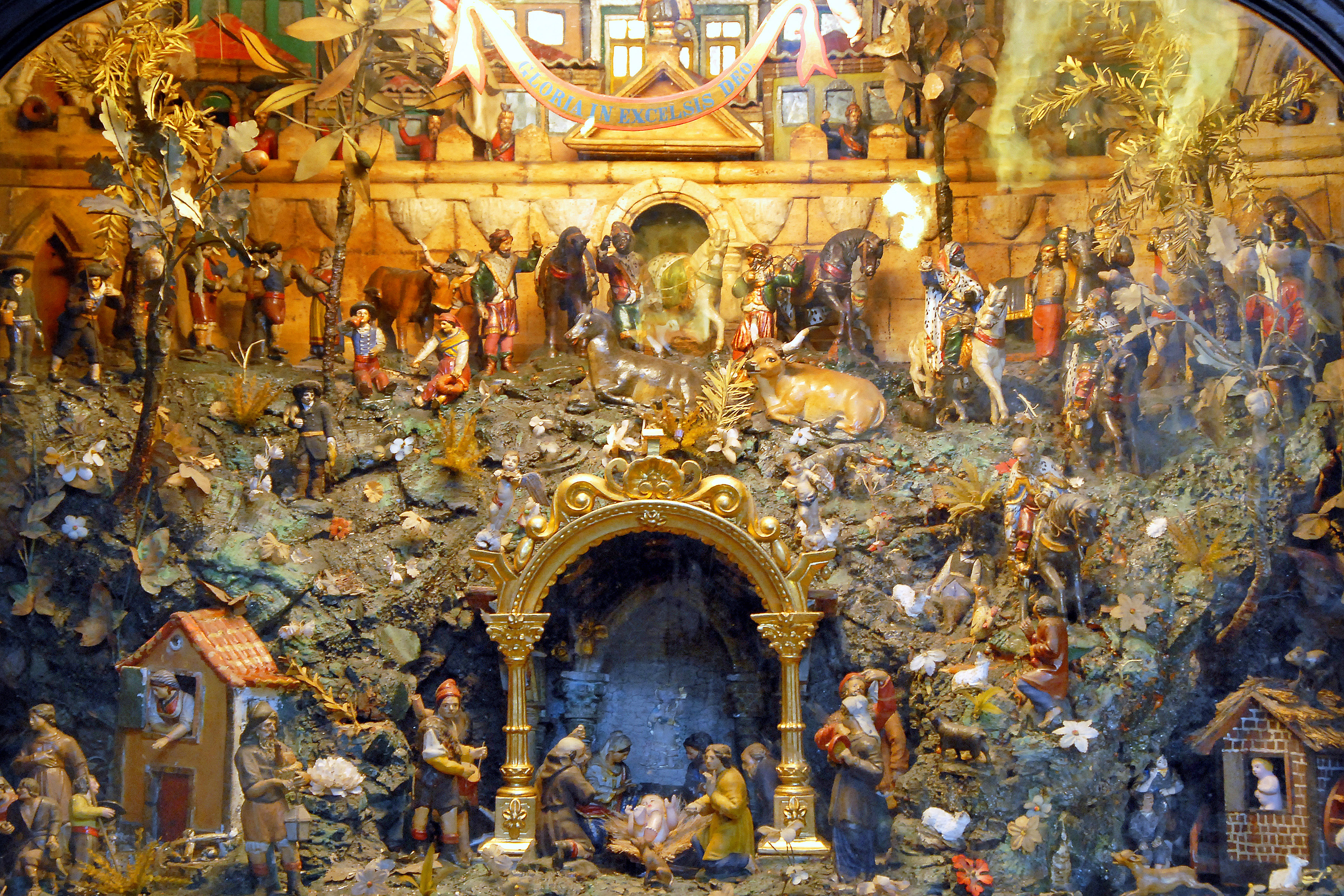 Igreja e Colégio de São Lourenço ou Igreja dos Grilos ou Seminário Maior da Sé do Porto This file was uploaded for Wiki Loves Monuments in Portugal with the unique identifier 70400.